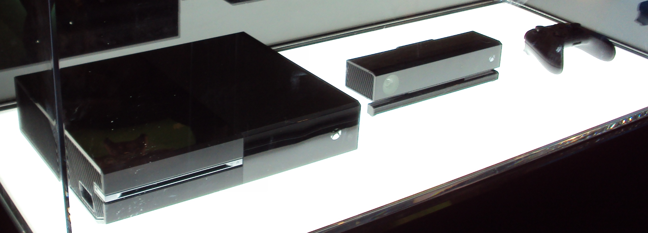 Xbox One op Gamescom 2013